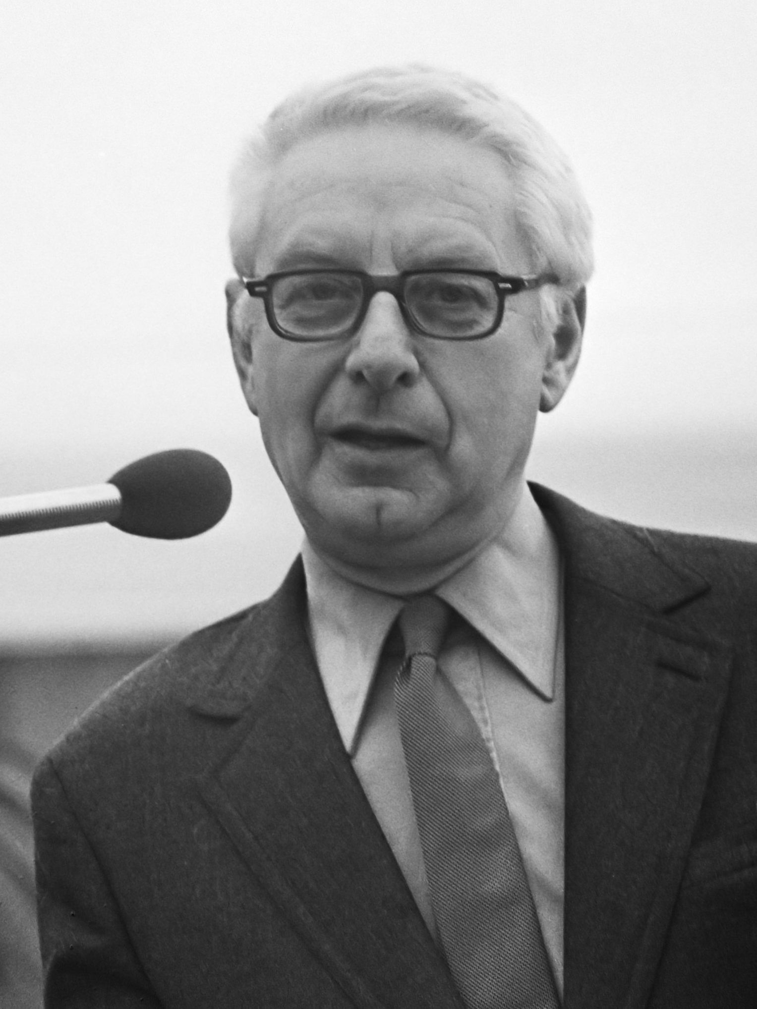 Opening nieuw hoofdkantoor groep Buhrmann-Tetterode (Paalbergweg-Brulwijk); prof. Pen 9 april 1976